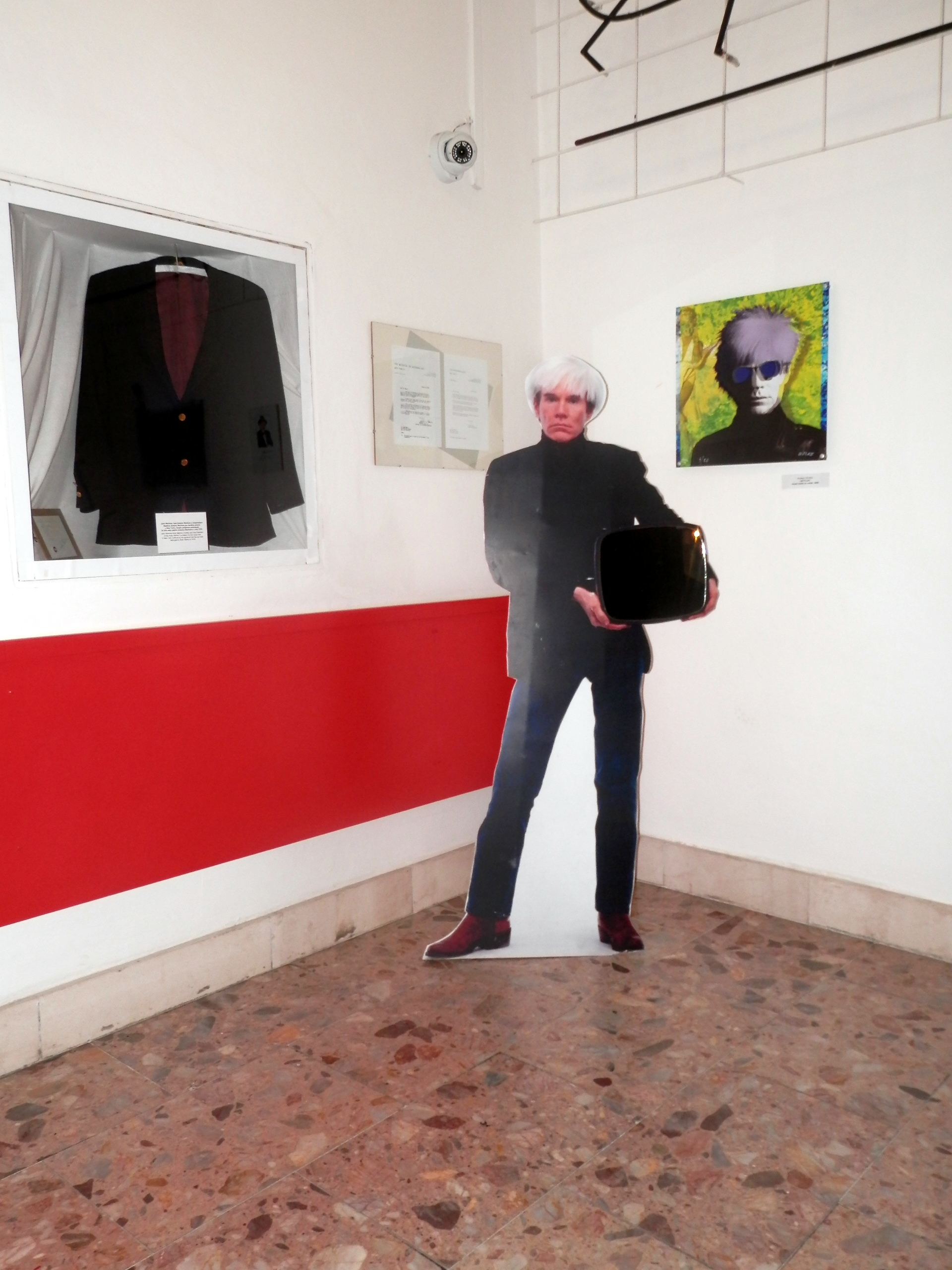 Múzeum Andy Warhol - interiér, mesto Medzilaborce Slovensko Leto 2016.